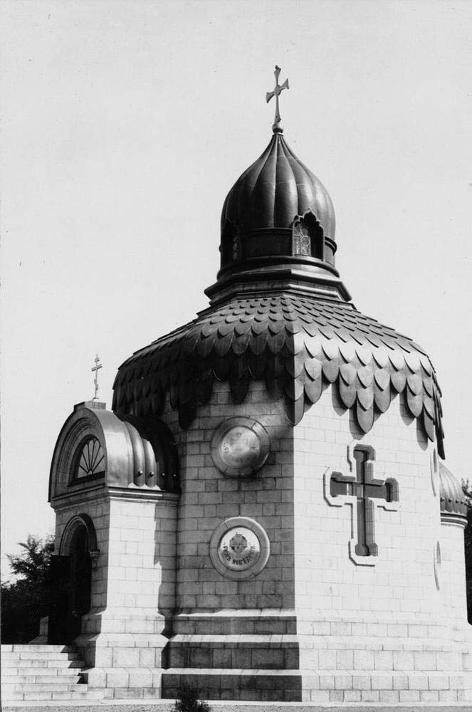 Храм-памятник Христа Спасителя на Русском кладбище. Шеньян (бывш. Мукден). 1912.